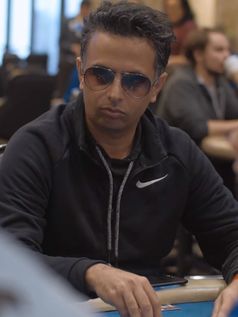 Nipun Java bei der WPT Gardens Poker Championship